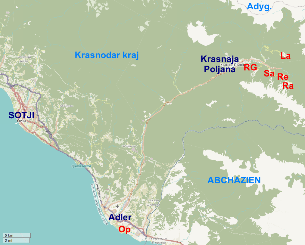 Delar av Sotjis stadskommun, med spelplatser för vinter-OS utmärkta.